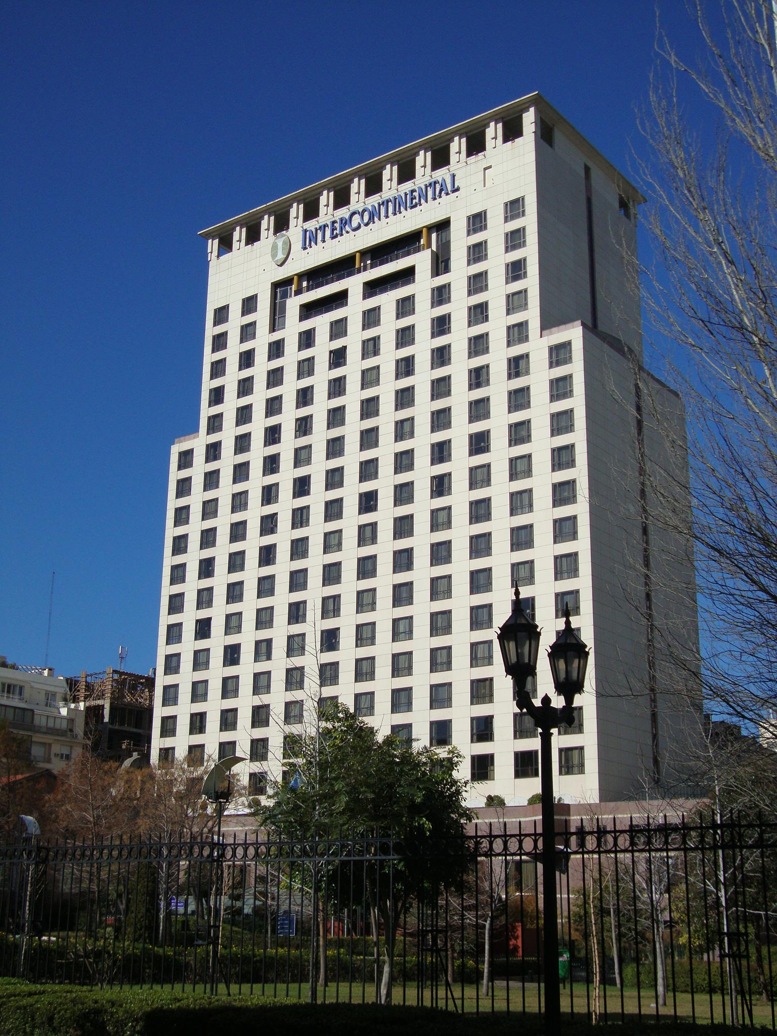 Hotel InterContinental Buenos Aires, en Moreno 809.